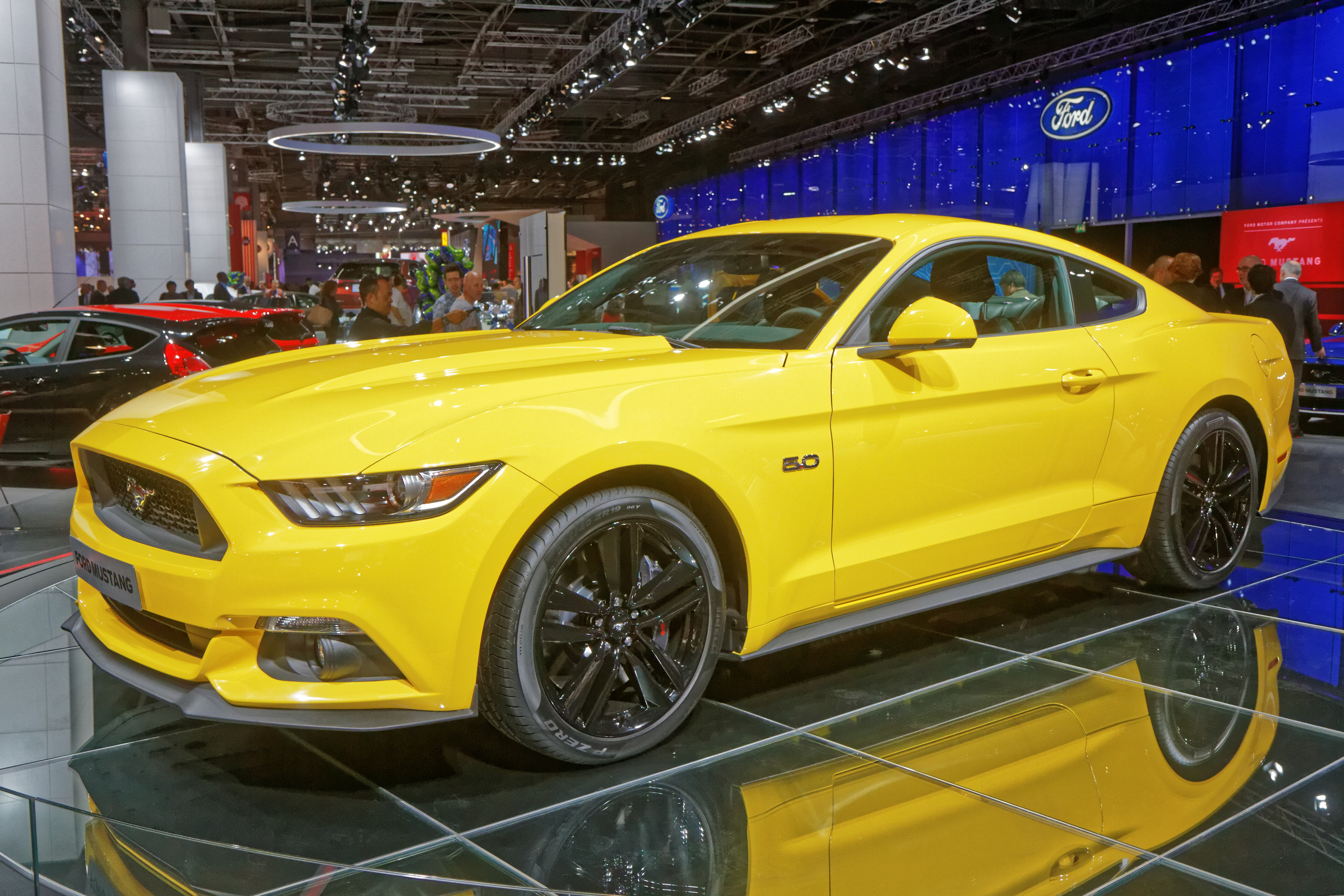 Une Ford Mustang Fastback présentée lors du mondial de l'automobile de Paris 2014.